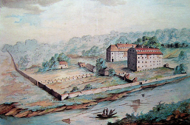 Marcelli Januszkiewicz (Marcelis Januškevičius ar Januševičius), Jėzuitų rūmai Vingyje, 1836 m.